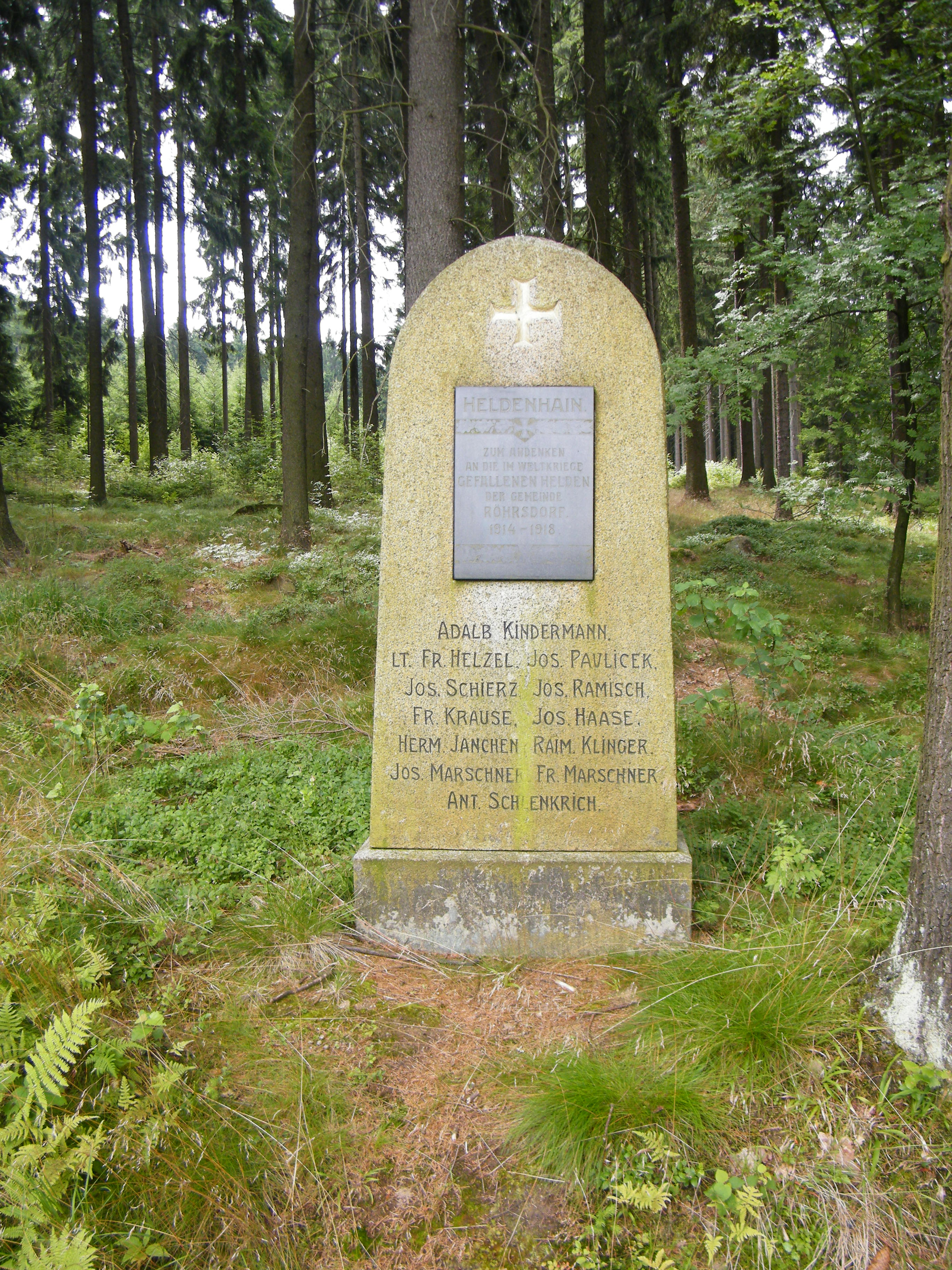 Pomník obětem první světové války v Liščím